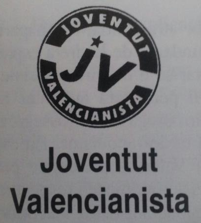 Logotip de la JV, 1999